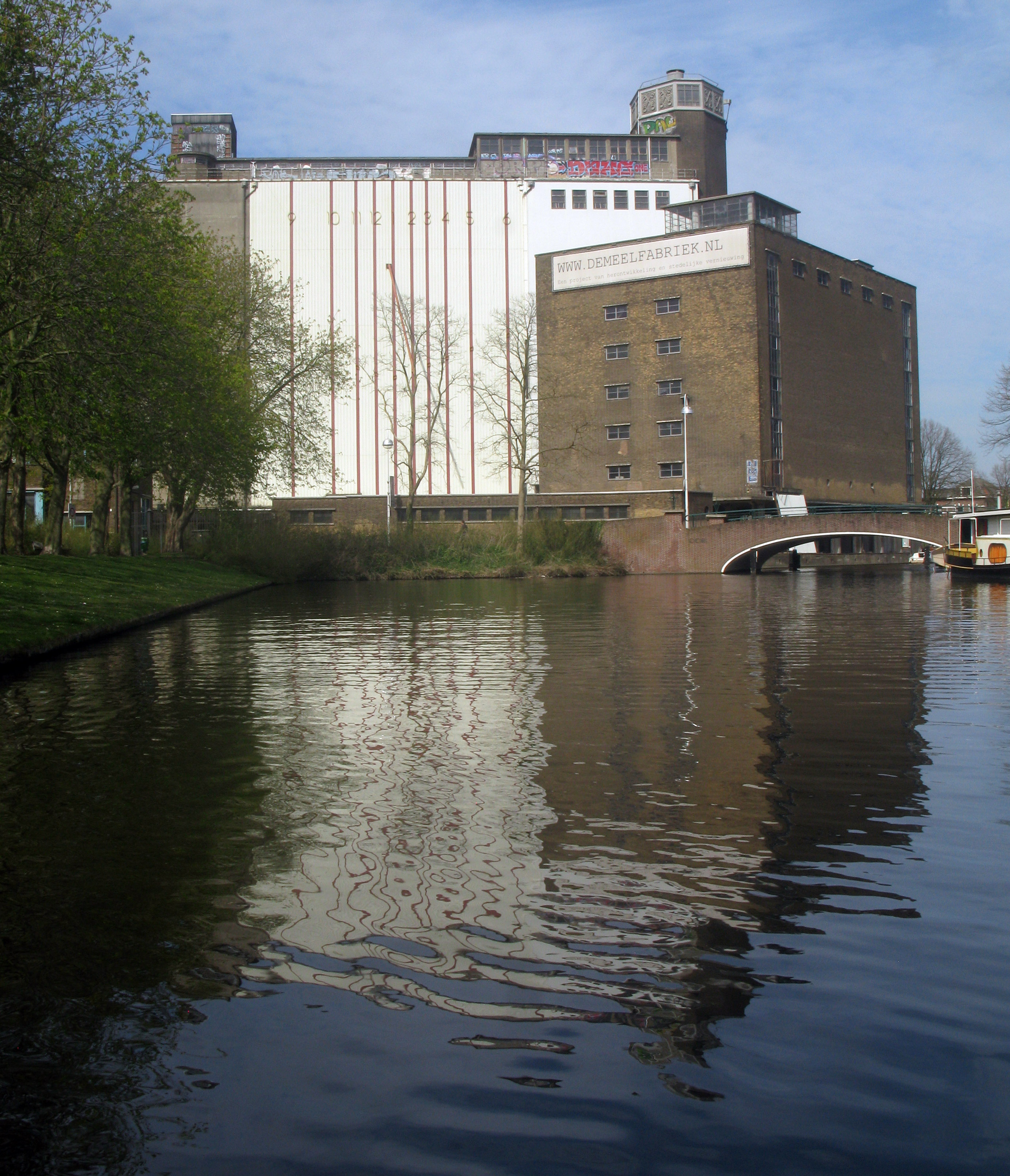 Leiden Meelfabriek